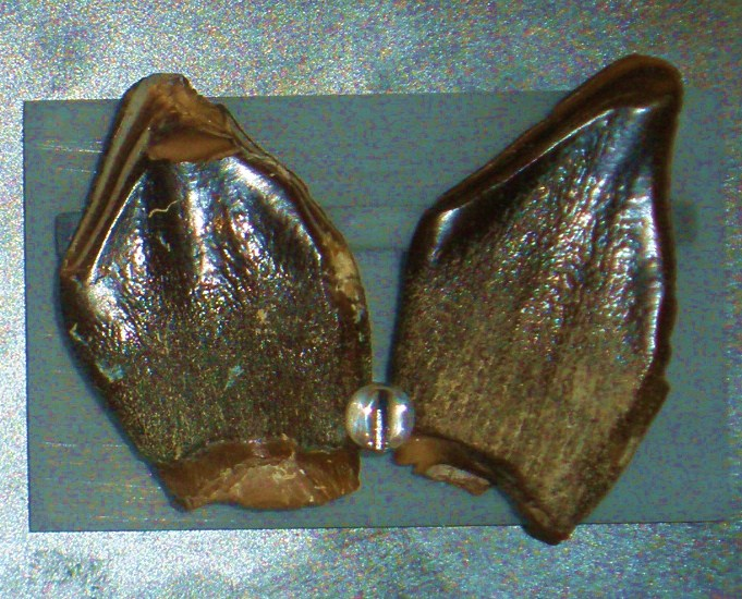 Fossil of Pelorosaurus, an extinct dinosaur-- Took the photo at Natural History Museum, London